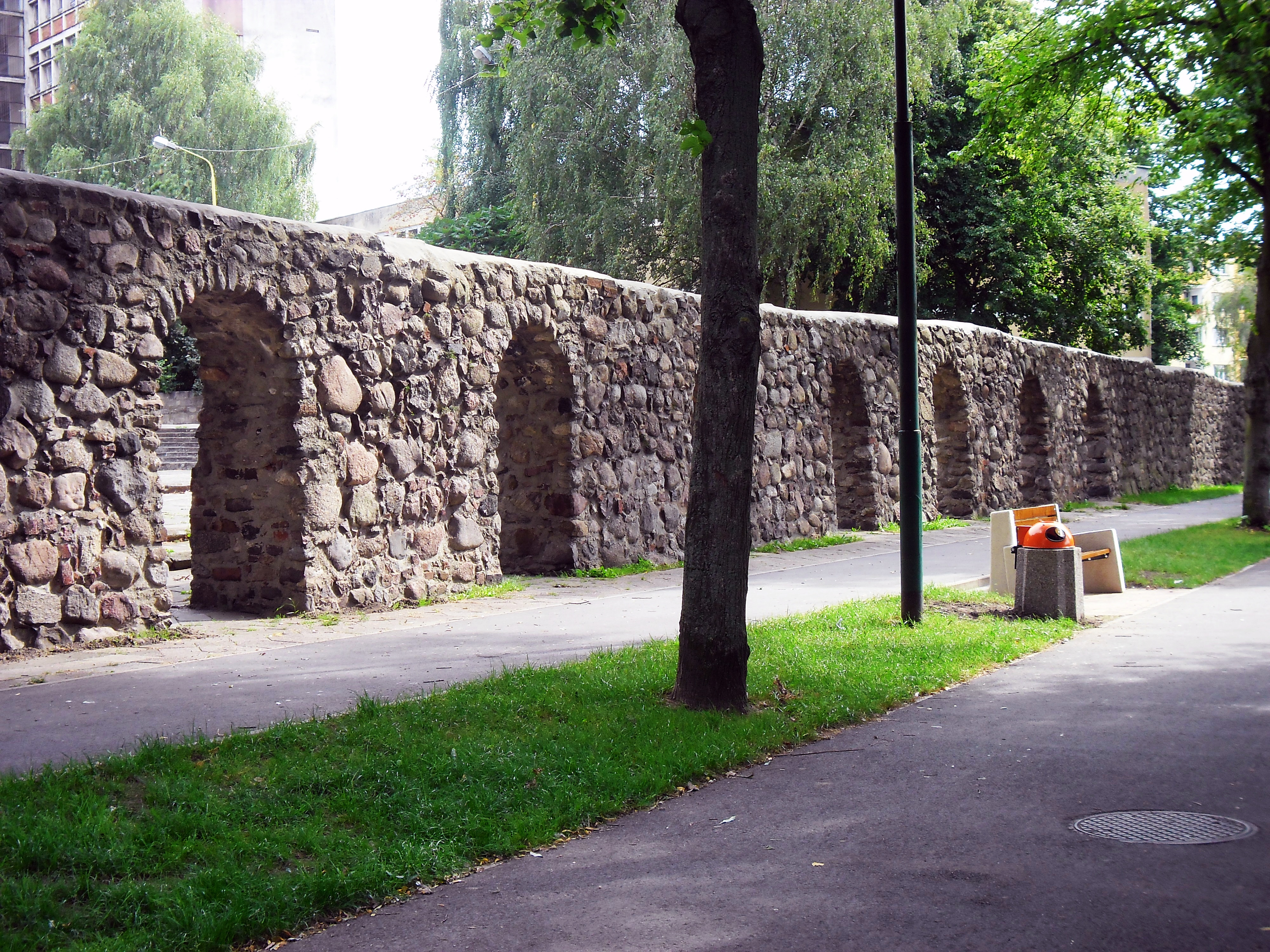 Nowogard, mury obronne, poł. XIV